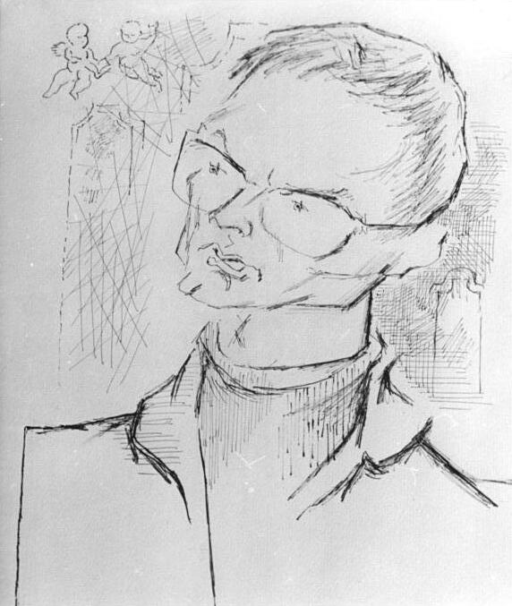 Zentralbild-Franke 19.4.68 Berlin: Sandberg-Ausstellung zum 60. Geburtstag. Die Karikatur des Schriftsteller Hermann Kant ist eine der vielen Abbildungen prominenter Kultur- und Geistesschaffender der DDR, die auf der Sandberg-Ausstellung im Kupferstichkabinett der Staatlichen Museen zu Berlin zu sehen sind. Die Ausstellung wurde am 17.4.68 zum 60. Geburtstag des Malers, Grafikers und Karikaturisten Herbert Sandberg eröffnet.